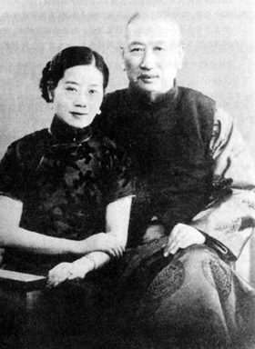 熊希龄与毛彦文结婚一周年纪念照